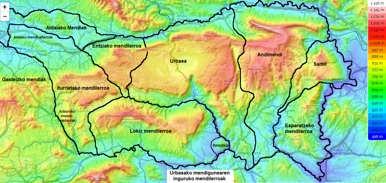 Urbasako mendigunearen inguruko mendilerroen mapa topografikoa.